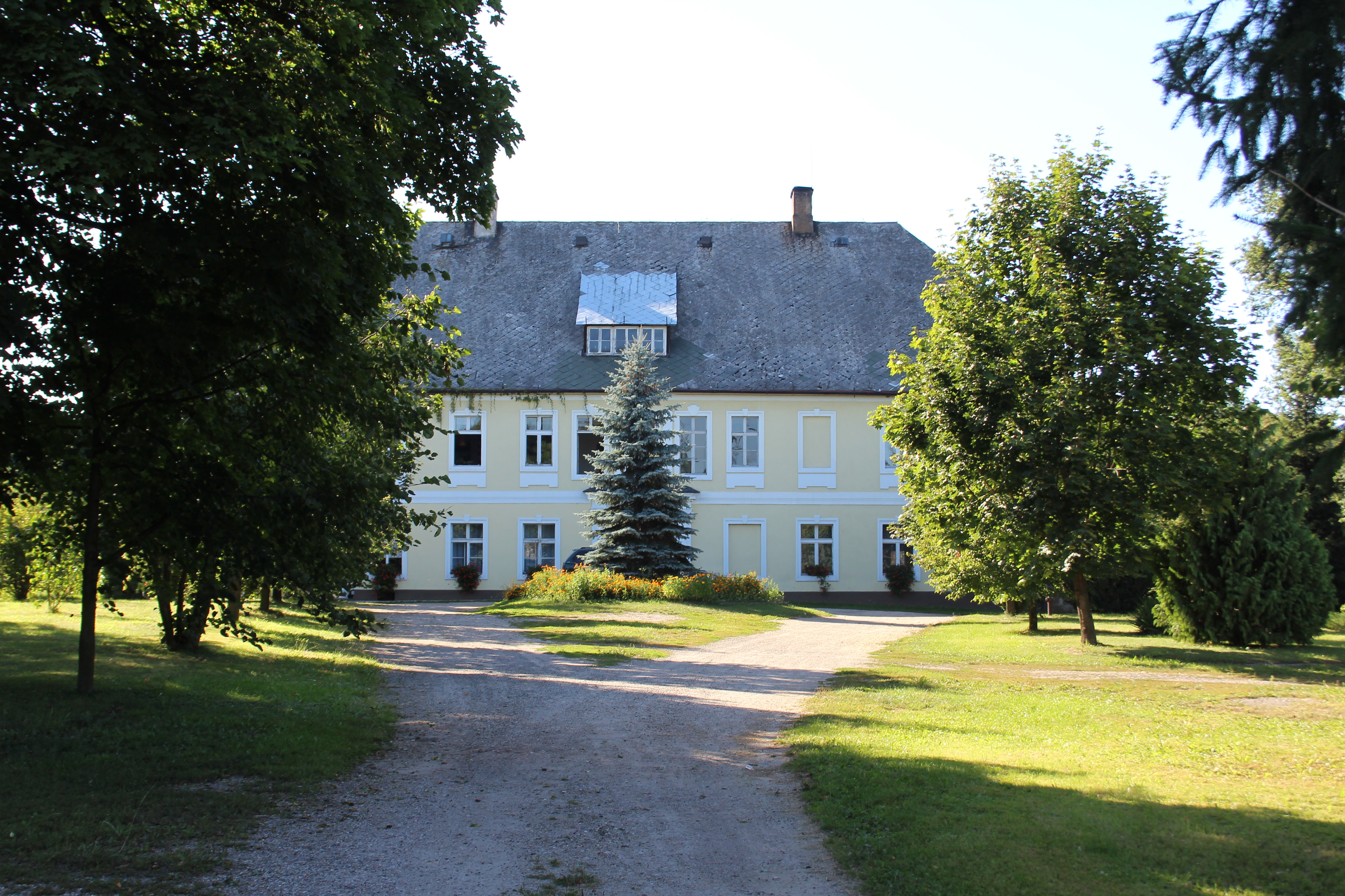 Pałac w Krasnej Górze - wieś w Polsce w województwie opolskim, w powiecie opolskim w gminie Niemodlin.